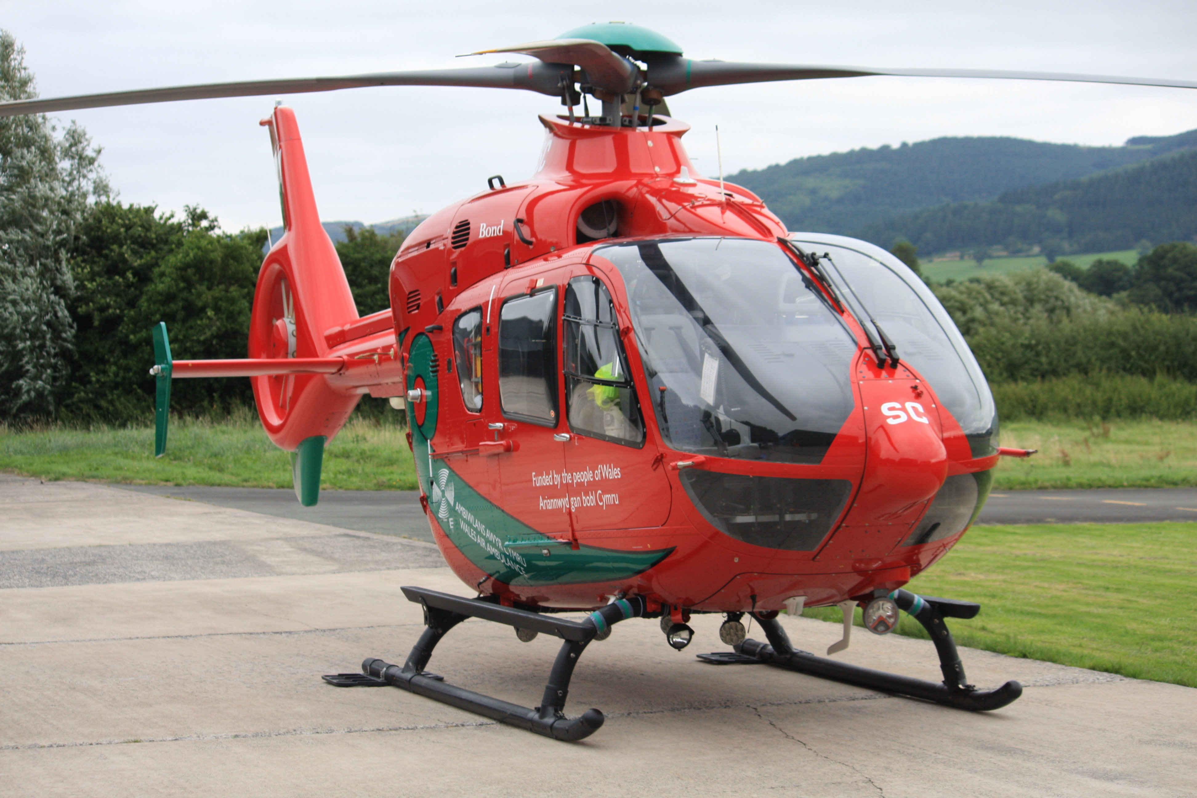 Welshpool (- Trehelig) (EGCW) UK - Wales, August 17 2013.